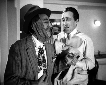 Fotogramma del film Totò cerca moglie (1950). Licensing Categoria:Immagini di Antonio De Curtis